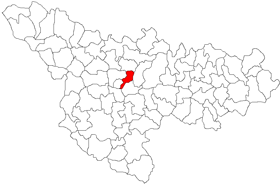 Categorie:Hărţi ale judeţului Timiş